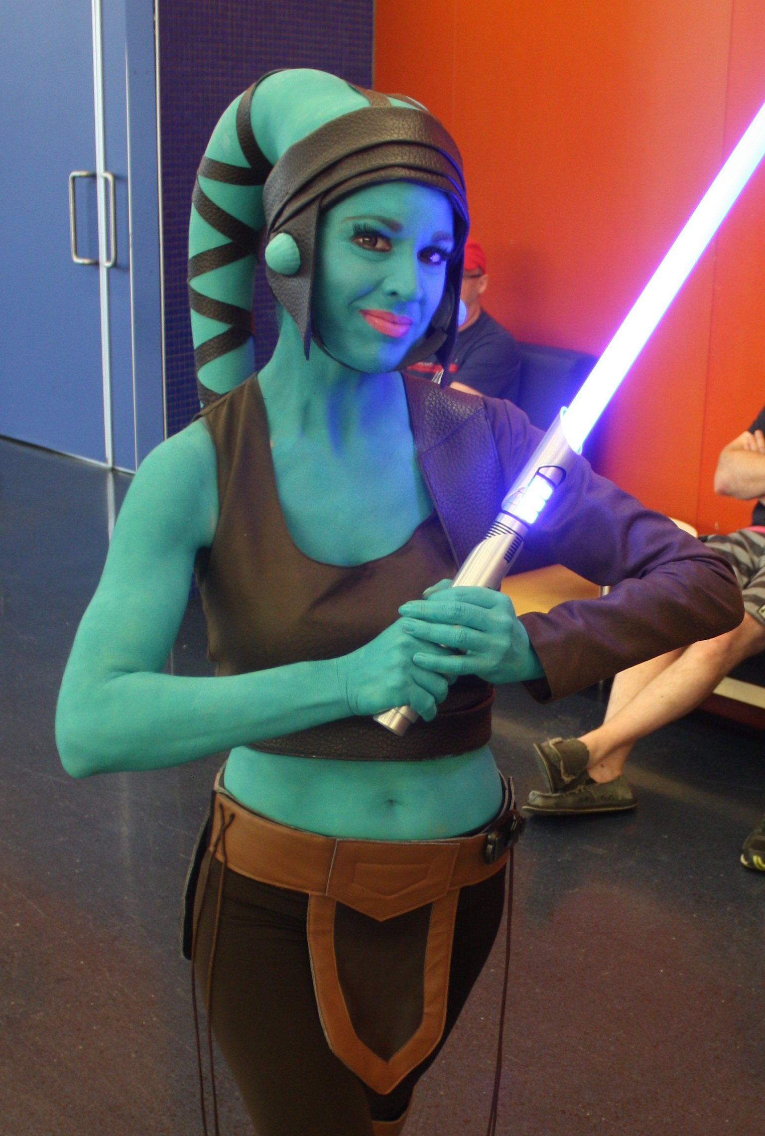 Cosplay Aayla Secura cropped 2